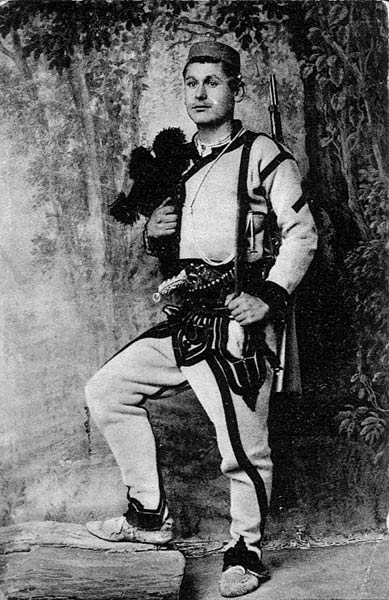 Bild eines jungen Mirditen in traditioneller lokaler Filz-Tracht mit Pistole und Gewehr.